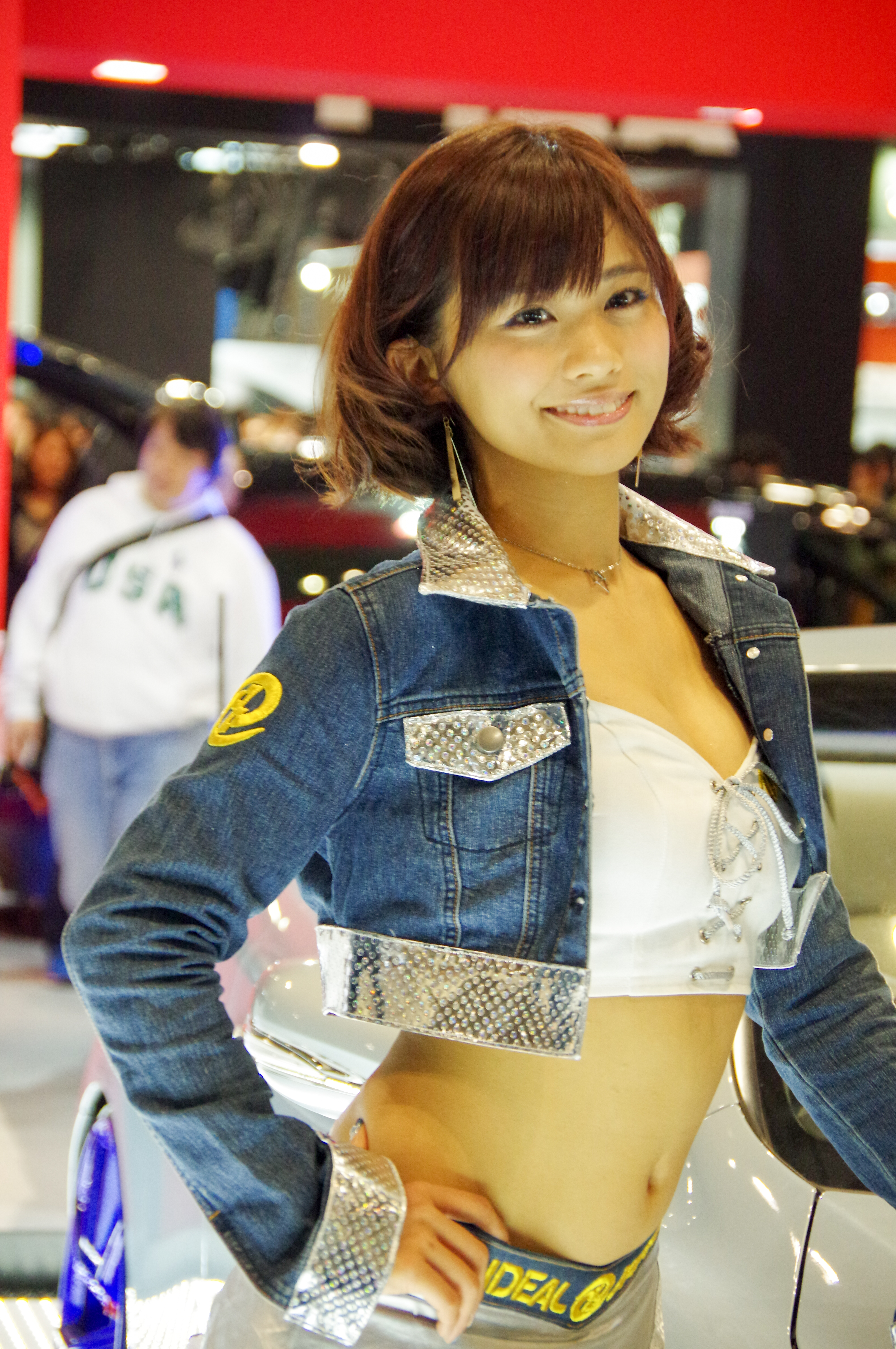 TOKYO AUTO SALON 2016 _42